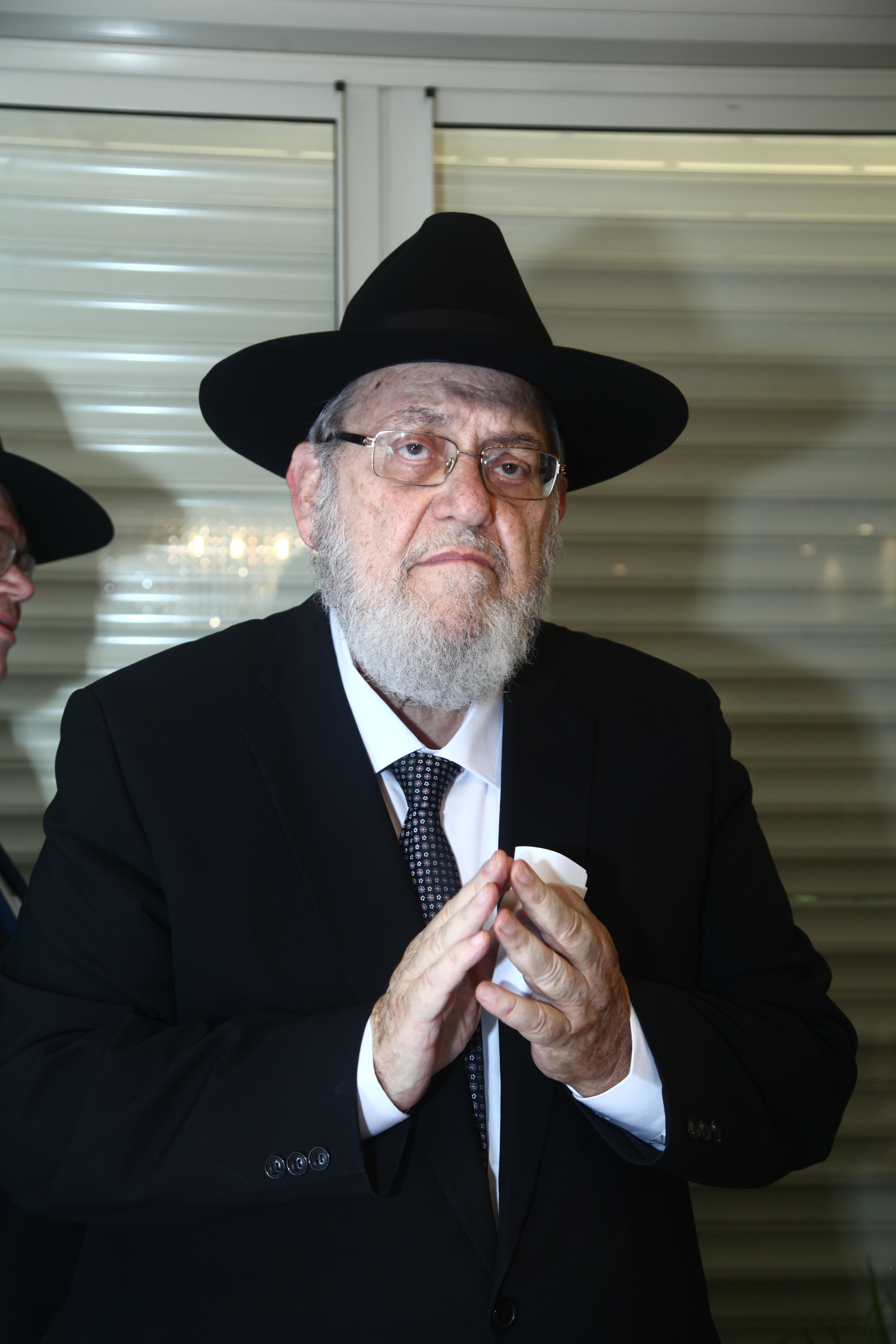 גרוזמן מאיר